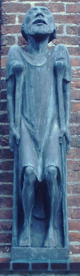 Der Bettler (1930) - Bronzeguss einer Statue von Ernst Berlach im Kloster-Innenhof des Ratzeburger Doms - eine Schenkung der Familie Barlach. Aufnahme: 25.7.2004 Url